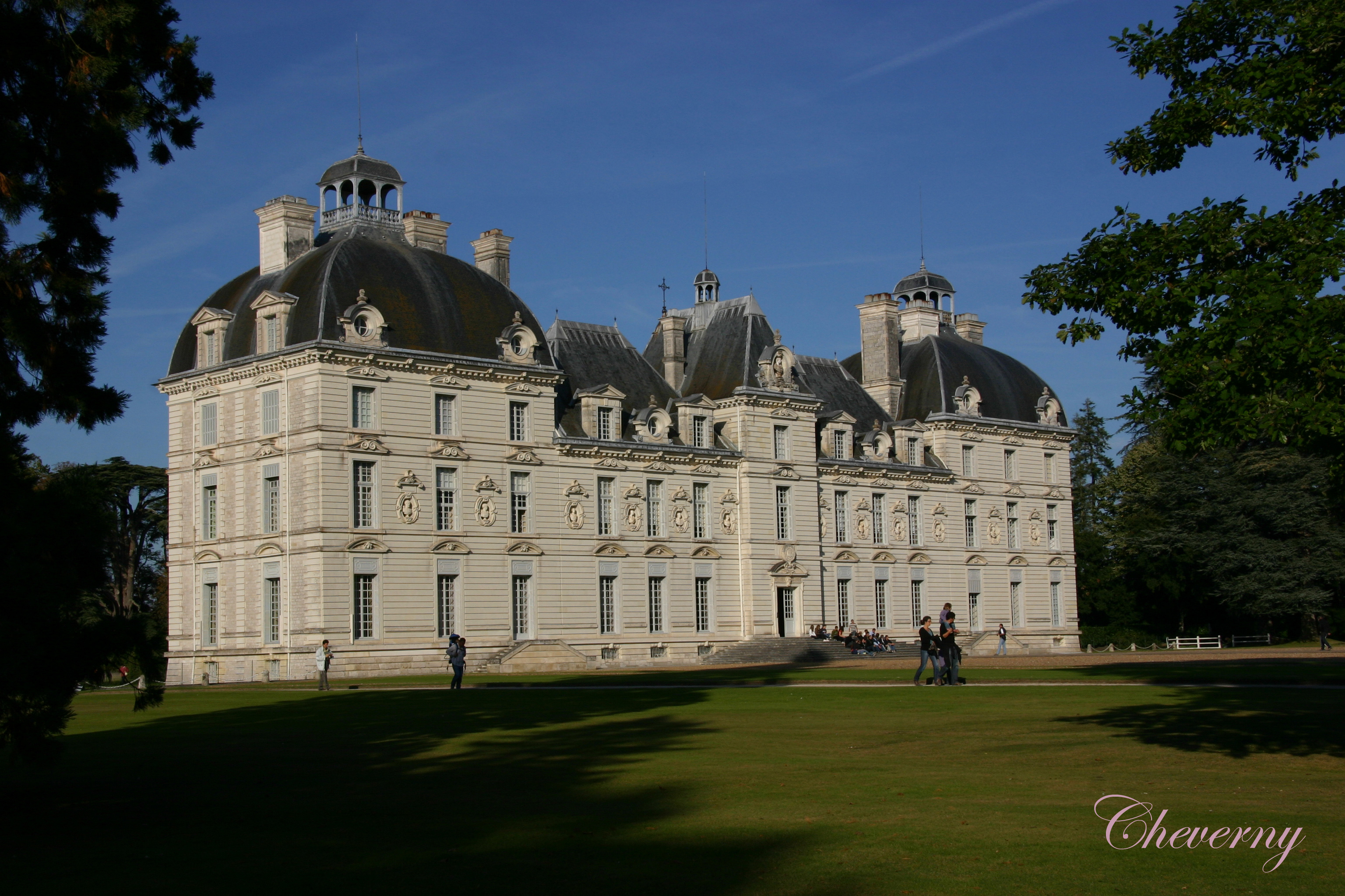 Château de Cheverny